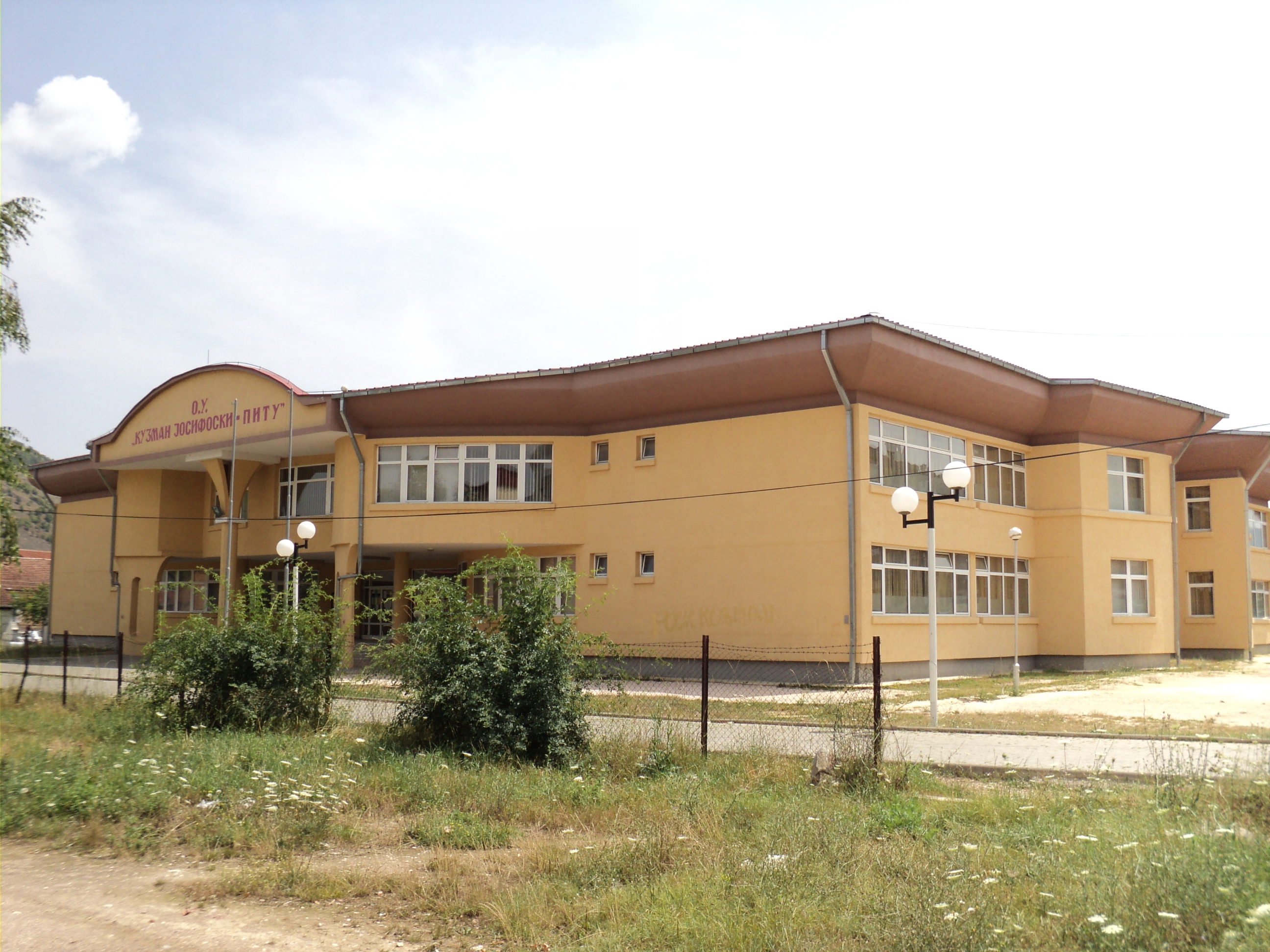 Zgrada Osnovne škole "Kuzman Josifovski Pitu" u Kičevu